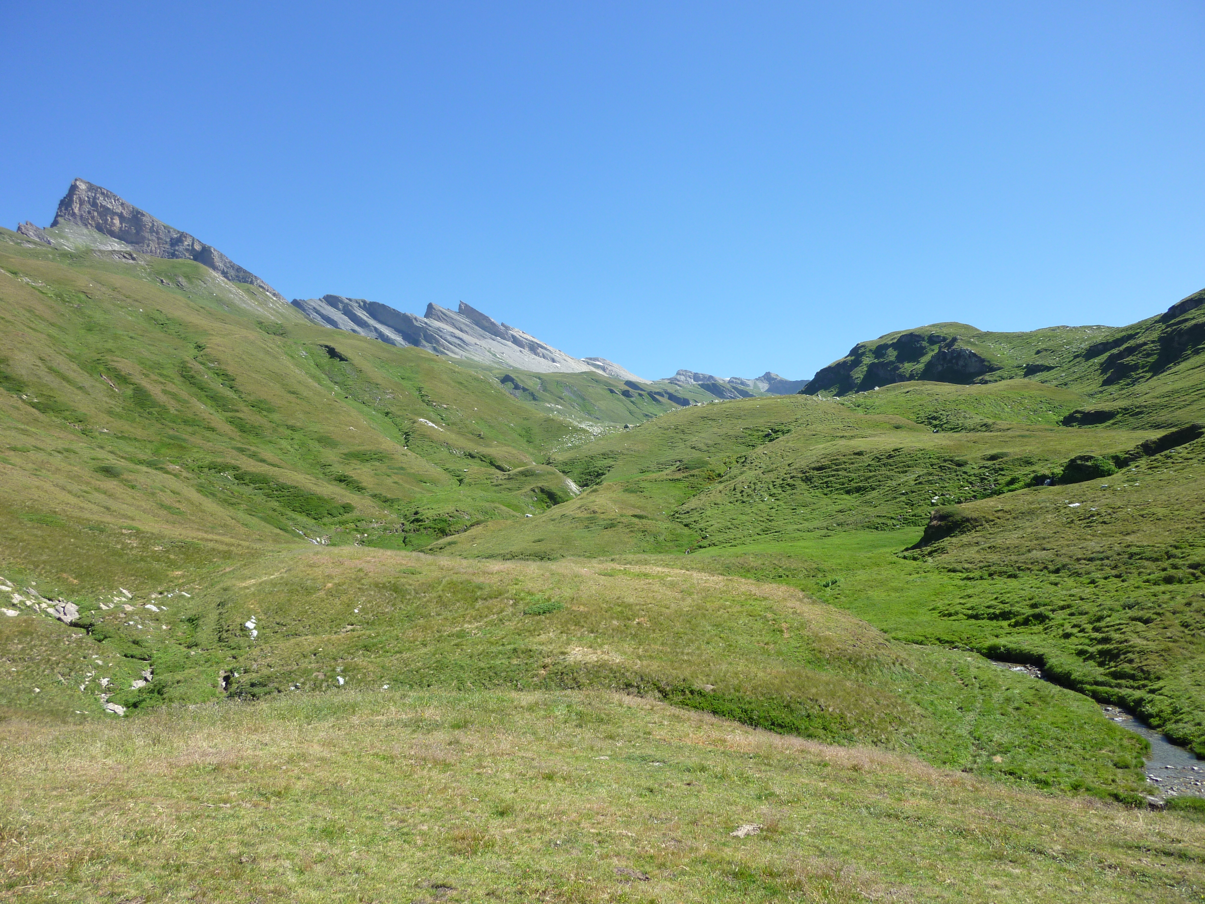 Val Vignun